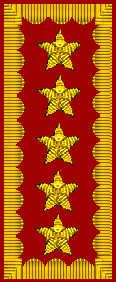 Presilla de Capitán General (A. Pinochet)